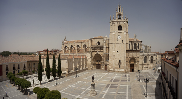 Catedral de San AntolÃ­n